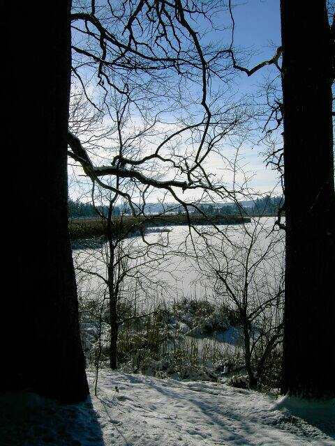 Blick auf den Südteil des Maisinger Sees